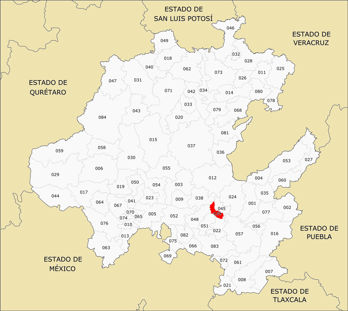 Municipios de Hidalgo